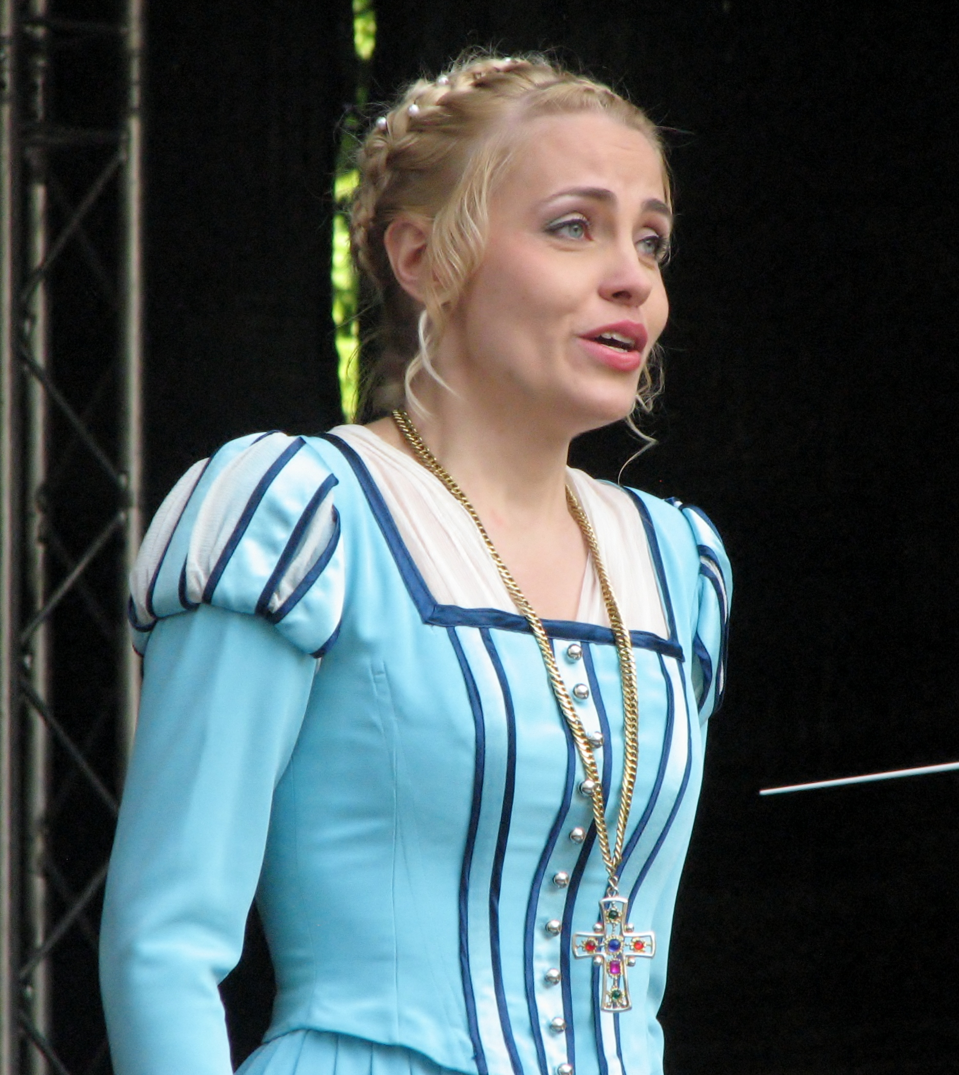 Kristel Pärtna esinemas Rahvusooper Estonia 107. hooaja avamisel